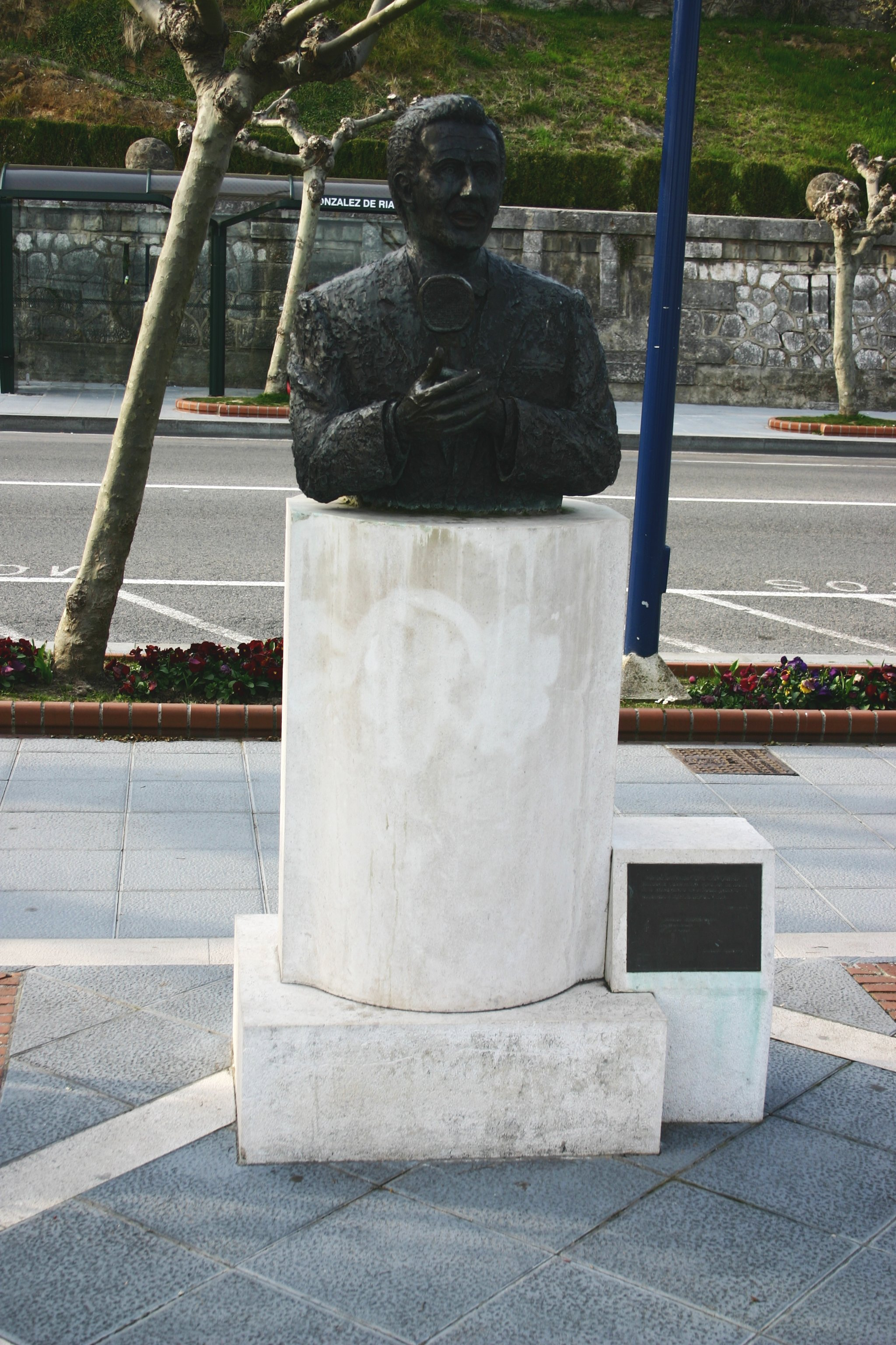 City of Santander. Estatua de Jorge Sepulveda (Santander). Está situada en la Avenida de la Reina Victoria. La estatua se colocó por iniciativa de Cope Cantabria.